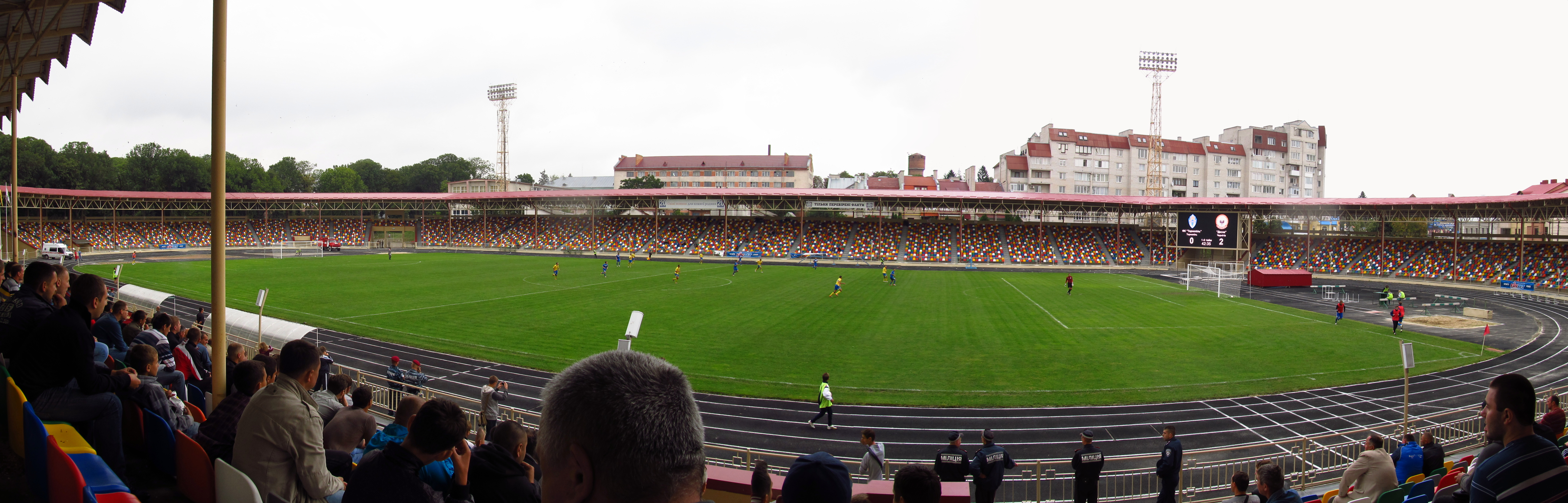 Повна назва - Комунальне підприємство "Тернопільський міський стадіон" - центральний стадіон Тернополя і найстаріша спортивна будівля міста (відкритий у 1909 році). 26 листопада 2009 року урядова комісія включила Тернопіль у державну програму з підготовки до чемпіонату Європи з футболу 2012, тож у Тернополі можуть створити тренувальну базу для команд-учасниць турніру.